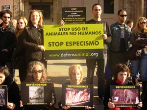 Foto de la Concentración que organizó en Valencia la ONG el 09/12/07 con motivo del Día Internacional de los Derechos Animales